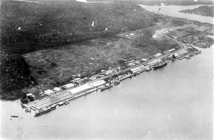 Repronegatief. Haven van Belawan, Borneo